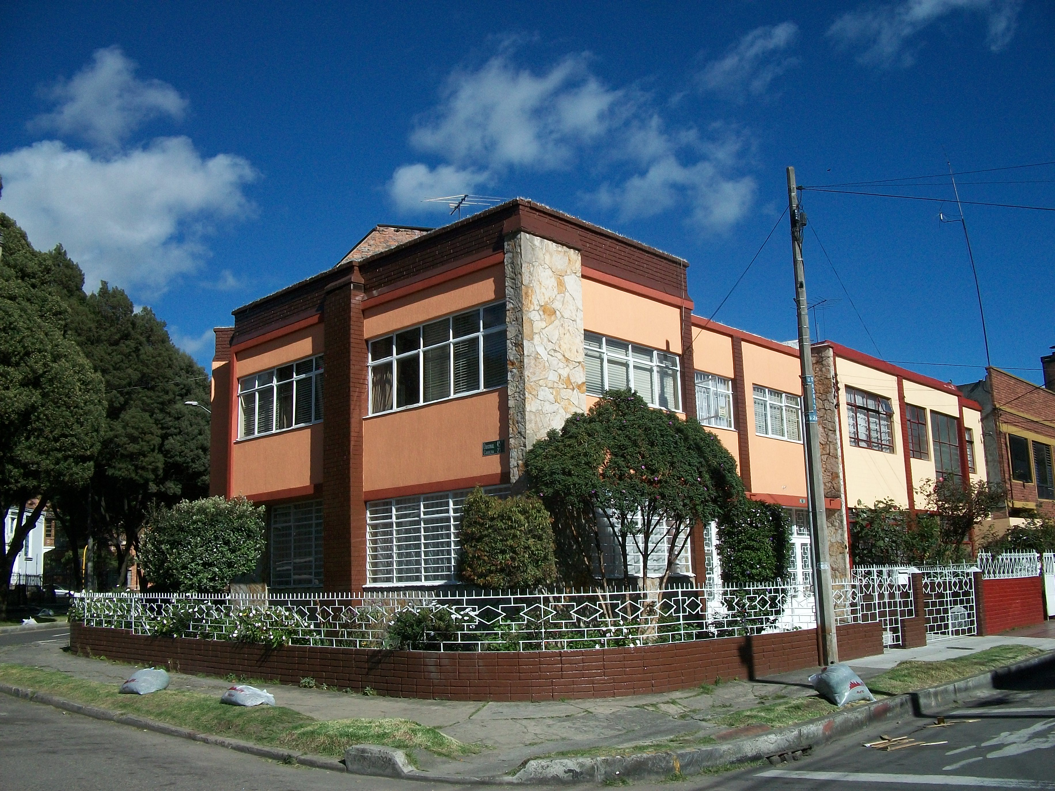 Casa en el barrio Palermo de la localidad de Teusaquillo, diagonal 45 bis, carrera 23. Bogotá D. C.